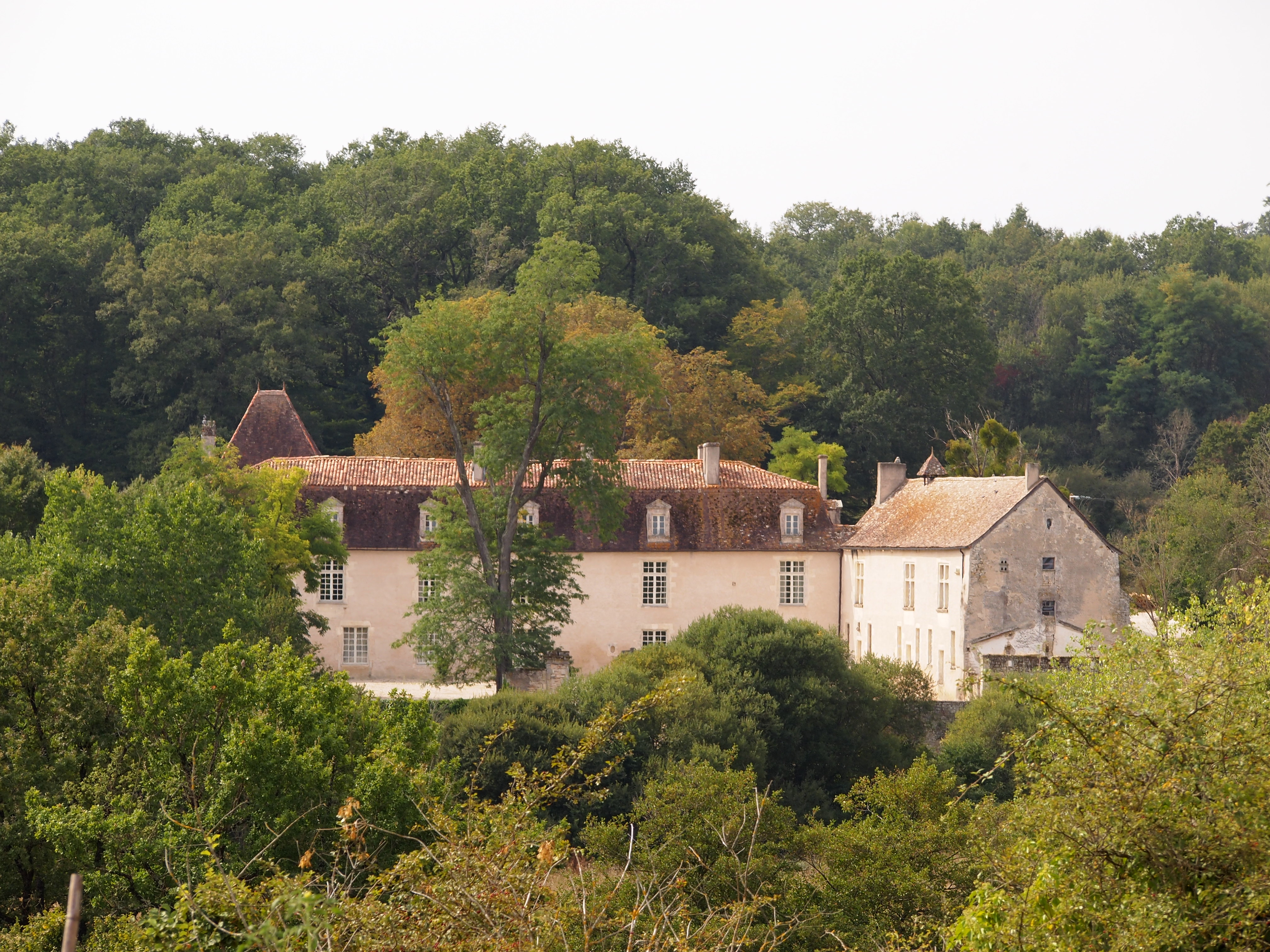 Château de la Faye, à Deviat en Charente (inscrit, 1992)